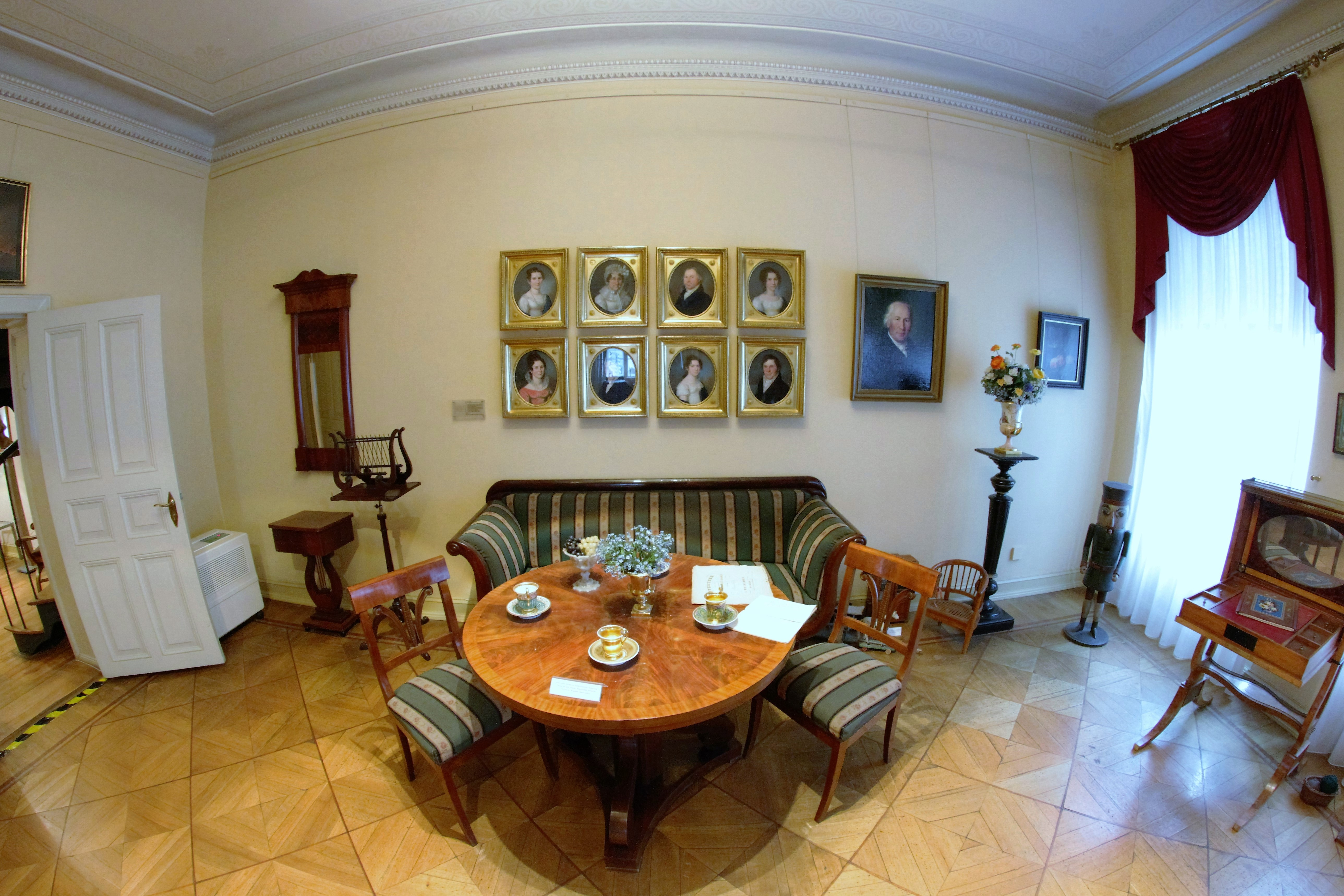 Das Knoblauchhaus in der Poststraße 23 Ecke Nikolaikirchplatz im Nikolaiviertel in Berlin-Mitte ist eines der wenigen am ursprünglichen Standort verbliebenen Berliner Bürgerhäuser des 18. Jahrhunderts. Bauherr des 1761 fertiggestellten Wohn- und Geschäftshauses war der Nadlermeister Johann Christian Knoblauch. Es steht unter Denkmalschutz. ( Zitat Wikipedia)